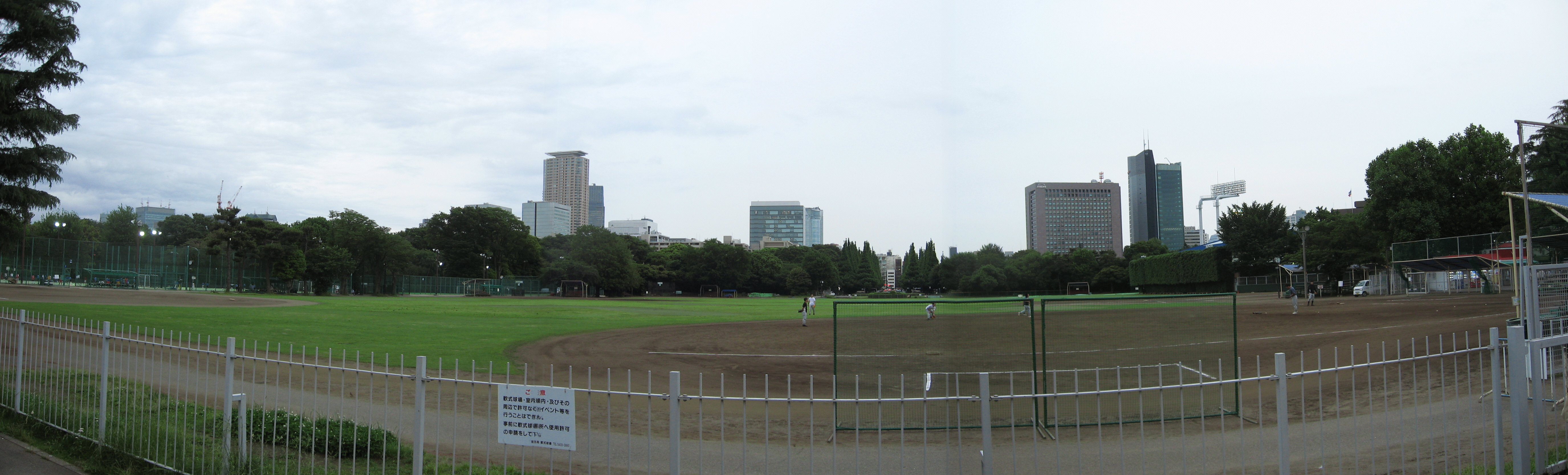 明治神宮外苑・軟式球場